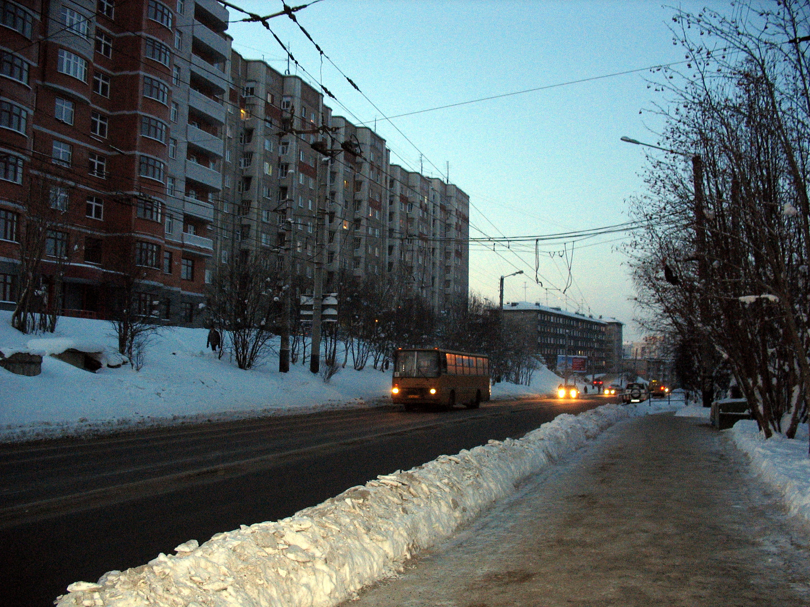 Просп. Кирова